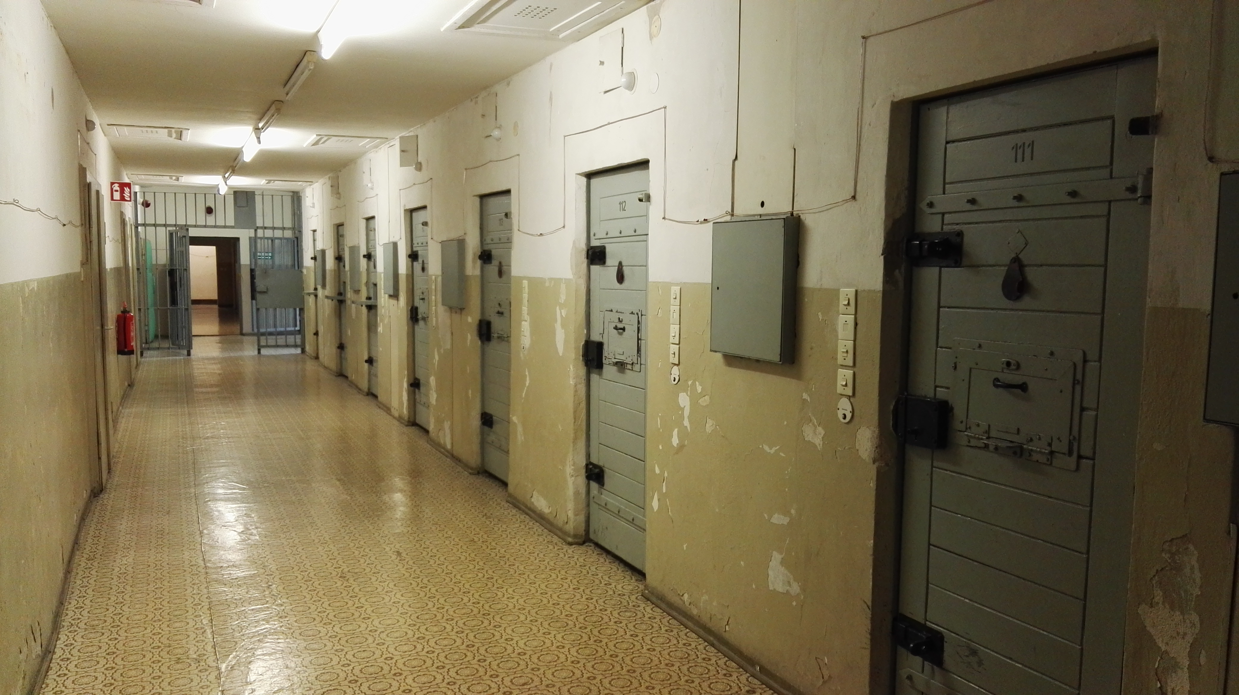 Gedenkstätte Berlin-Hohenschönhausen (Zellen)